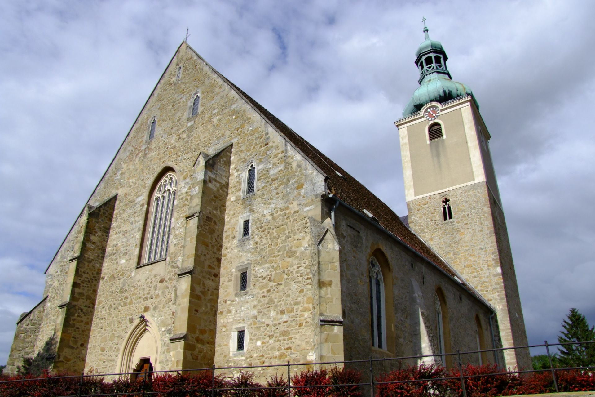 Kath. Pfarrkirche hl. Valentin